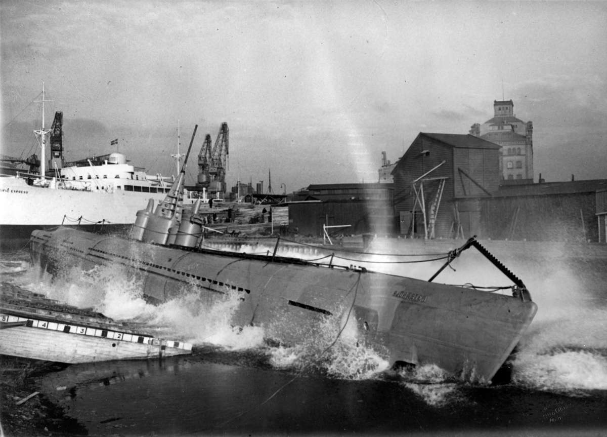 Den svenska ubåten HMS Sjöhästen sjösätts vid Karlskrona örlogsvarv.